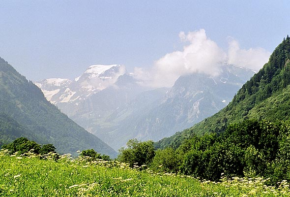 Glarnerland mit Tödi